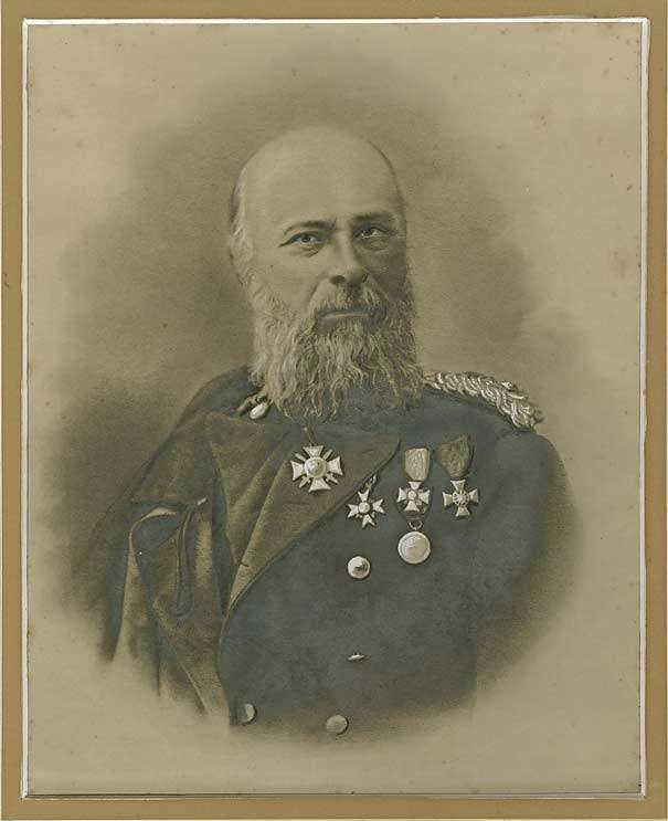 Friedrich Adolph von Seubert, Oberst und Kommandeur von 1870-1872